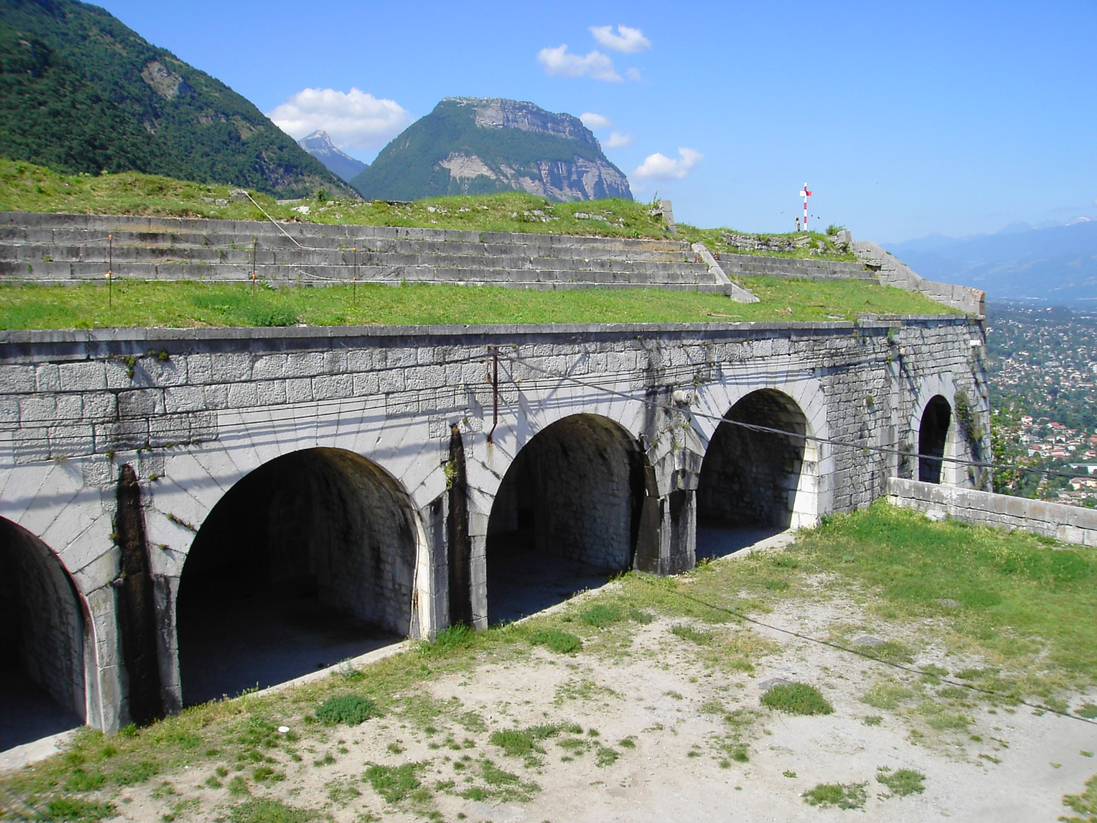 Casemate du fort de la bastille . Grenoble, France